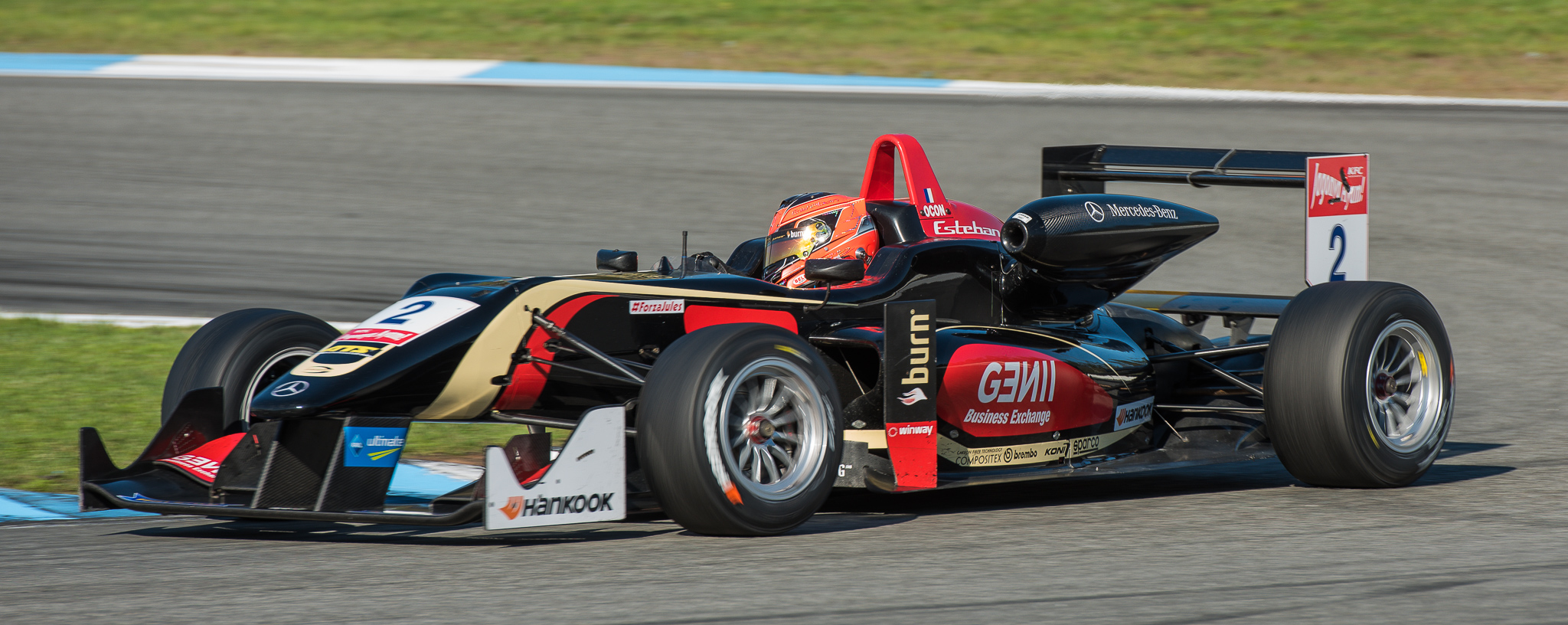 DTM,Dallara F312,Deutsche Tourenwagen Masters,Esteban Ocon,F3 FIA European Championship,FIA Formel 3 Europameisterschaft,Hockenheimring,Mercedes-Benz,Motorsport,Prema Powerteam